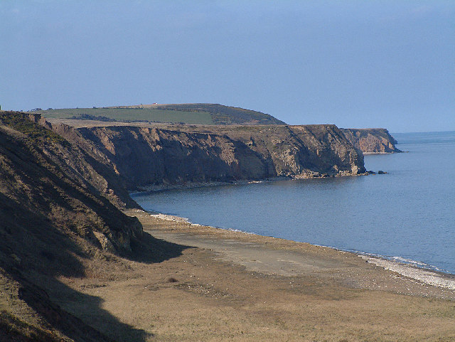 Blackhall Rocks